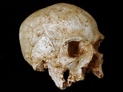 Hofmeyr skull, Homo sapiens